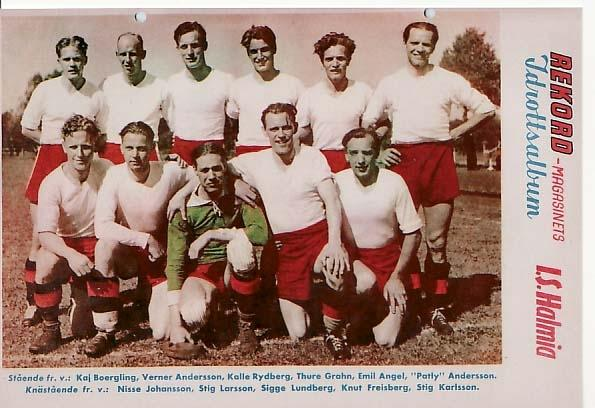 IS Halmia vid den allsvenska starten, den 31 juli 1943.